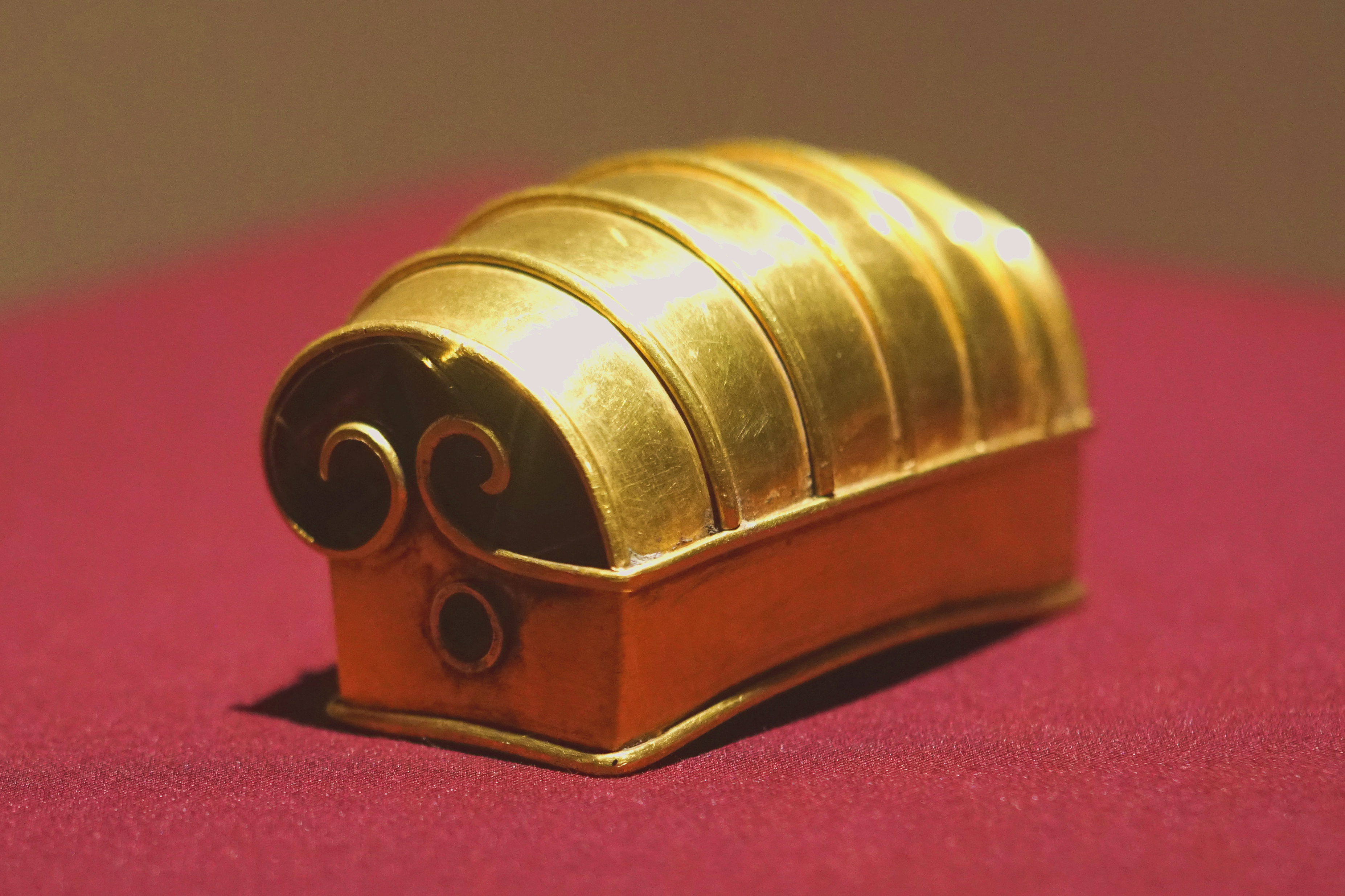 中文（中国大陆）: 金冠 明代 南京江宁将军山沐瓒墓出土